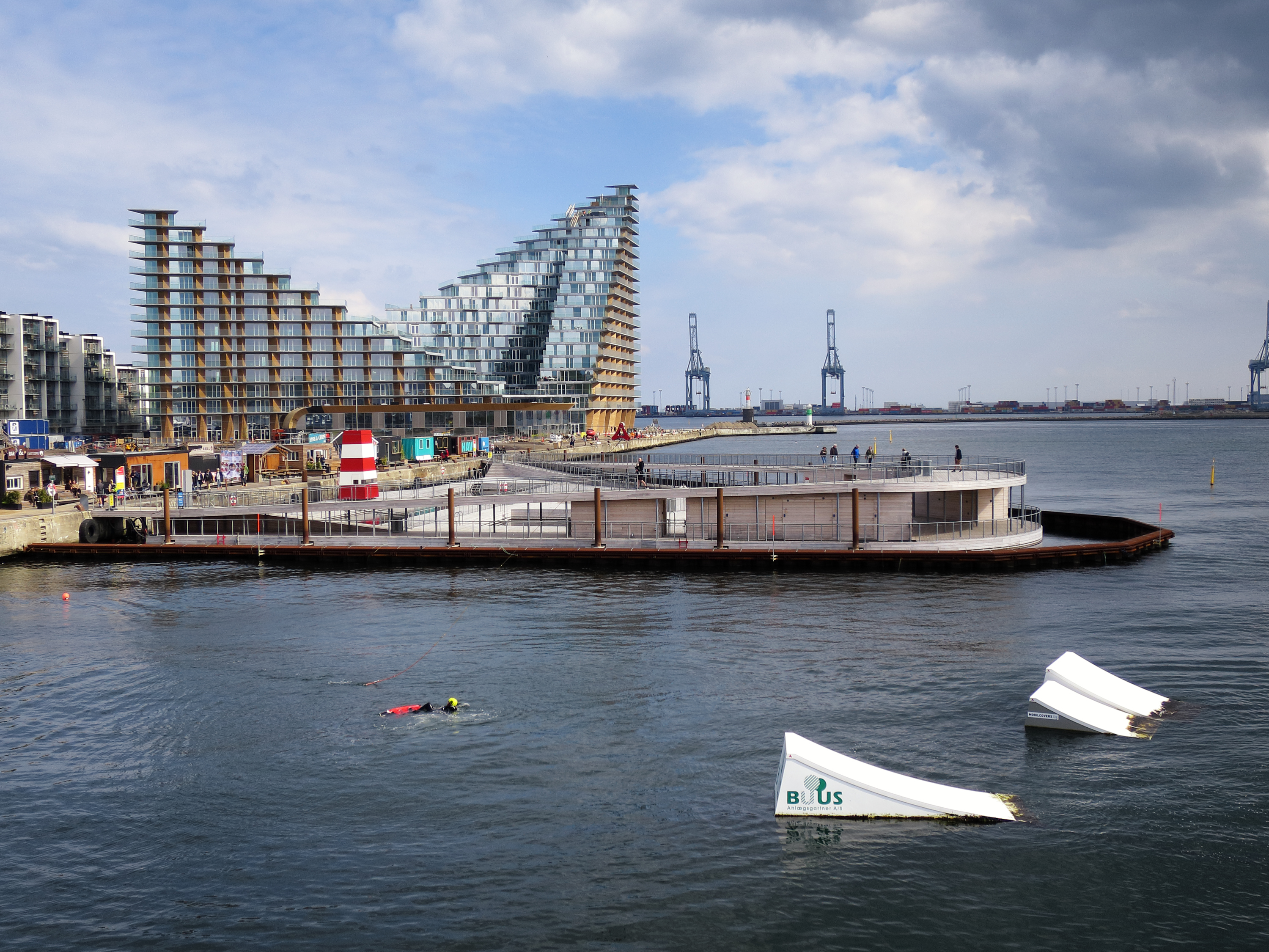 Havnebadet i bassin 7 ved Aarhus Ø.